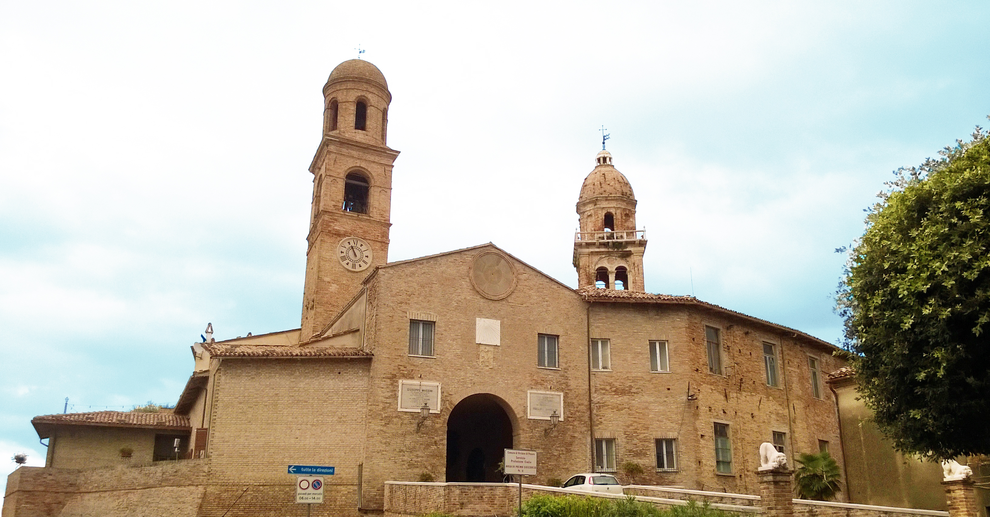 Orciano di Pesaro - Ingresso al Castello. Vista da Piazza Garibaldi